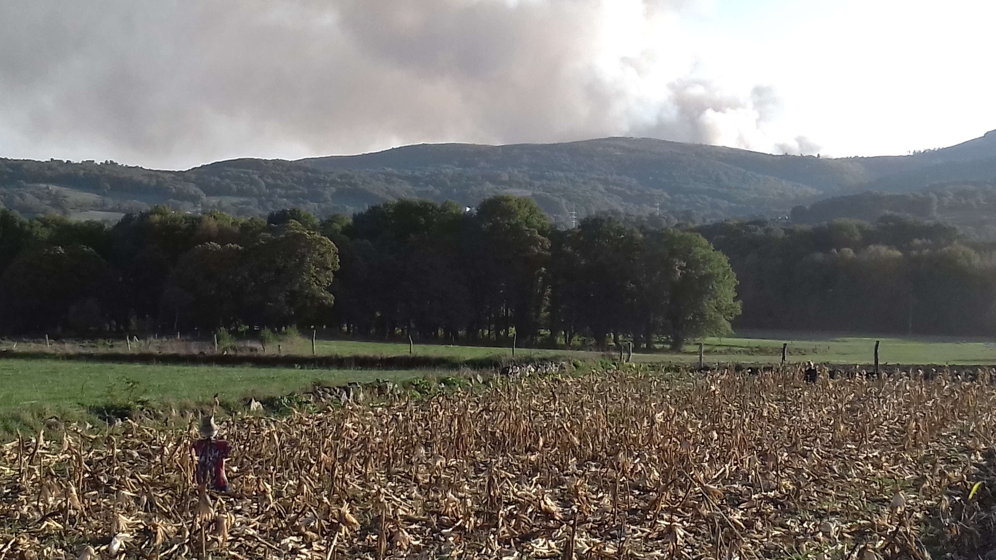 Monte do Faro ardendo